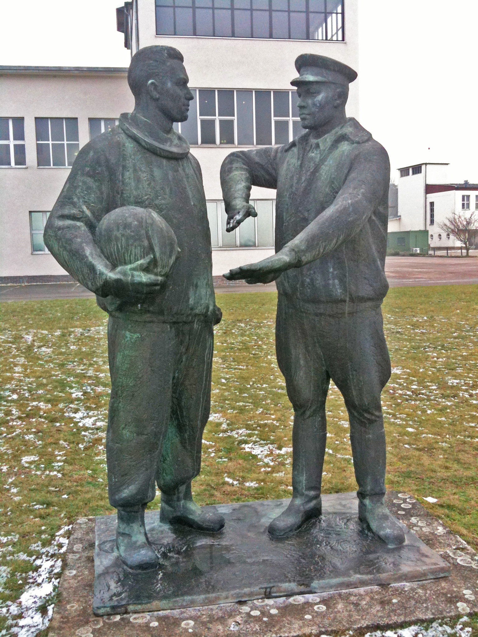 „Waffenbrüberschaft“ (von links nach rechts) Pilot der NVA Luftstreitkräfte mit sowjetischem Instrukteur (im NVA Fliegerjargon: „der Wissende und der Dumme“). Ehemaliger Originalstandort: Ehrenhain Kommando LSK/LV (Strausberg, Barnim-Kaserne) unmittelbar vor Haupteingang zur Stabszone.